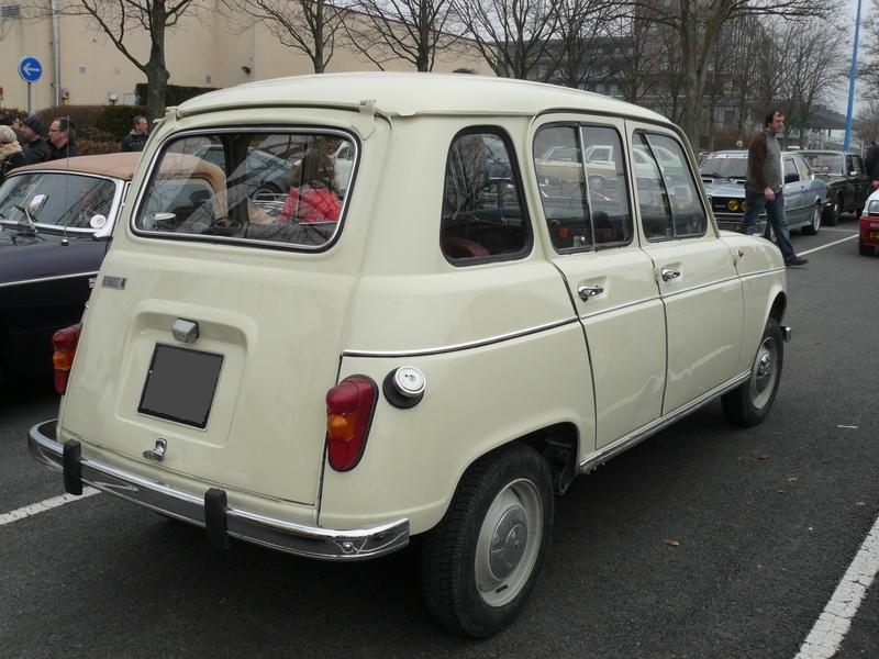 Reims 2012